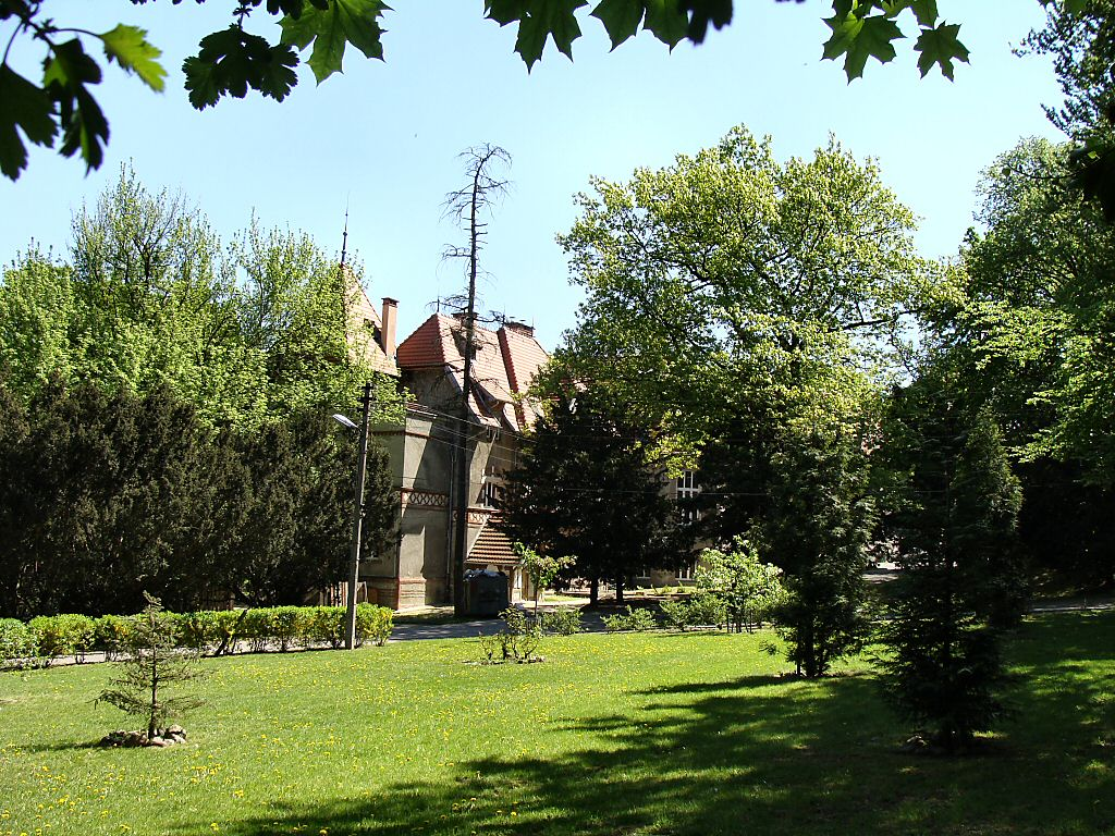 Dom Dziecka przy ul. Walecznych 23 w Szczecinie - obiekt zabytkowy